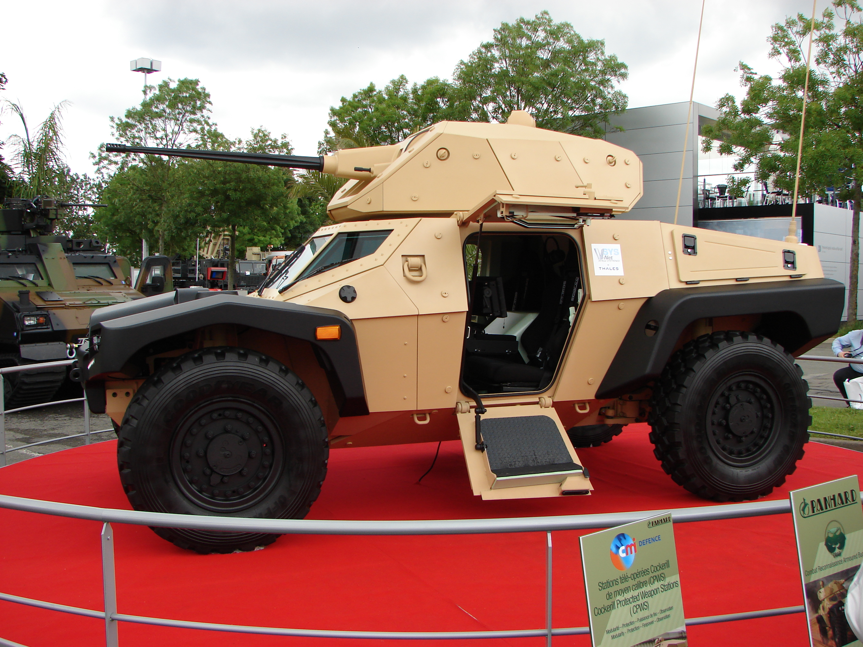 Panhard CRAB à Eurosatory 2012